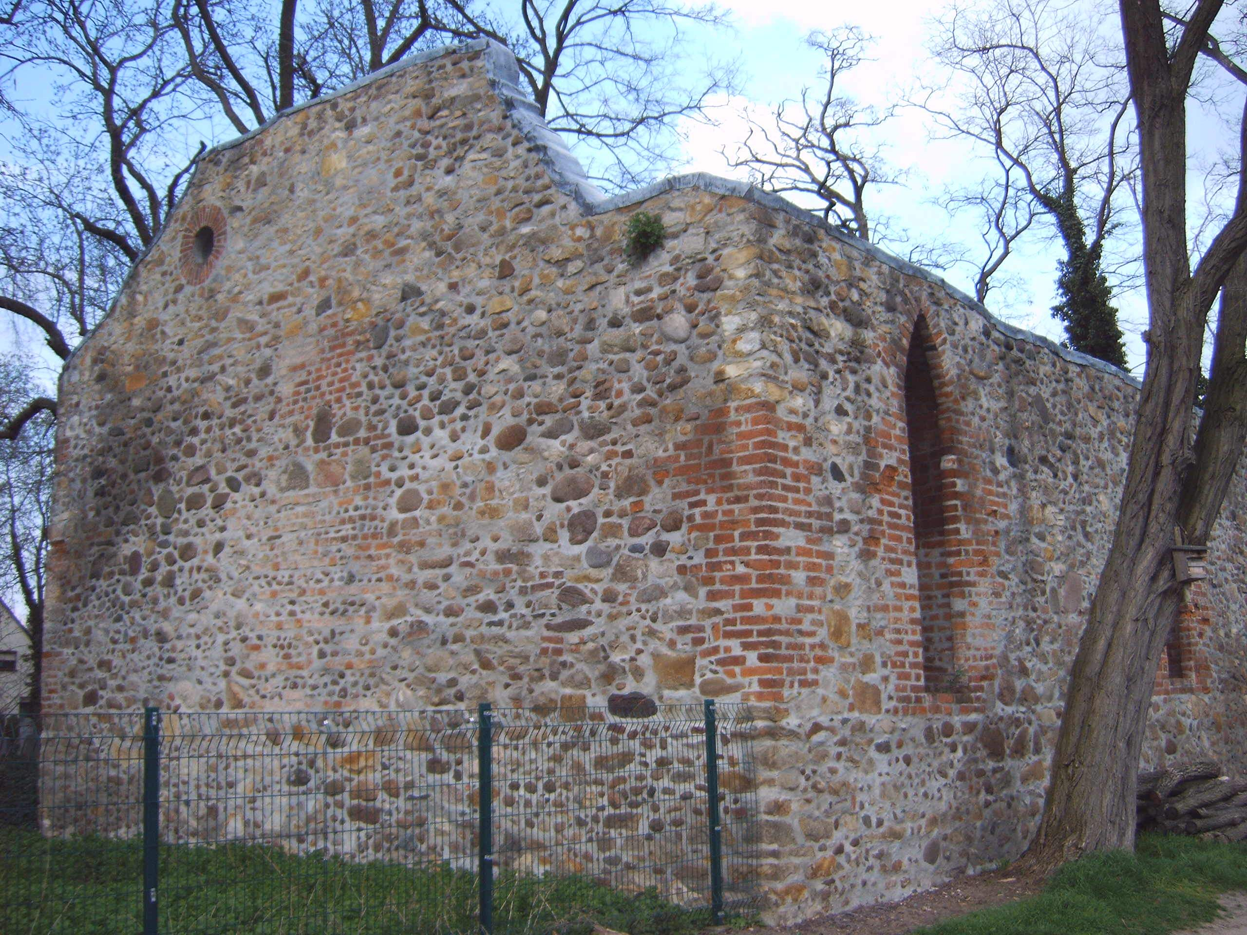 Ruine der Gutskapelle Pöthen, Pöthen, Gommern